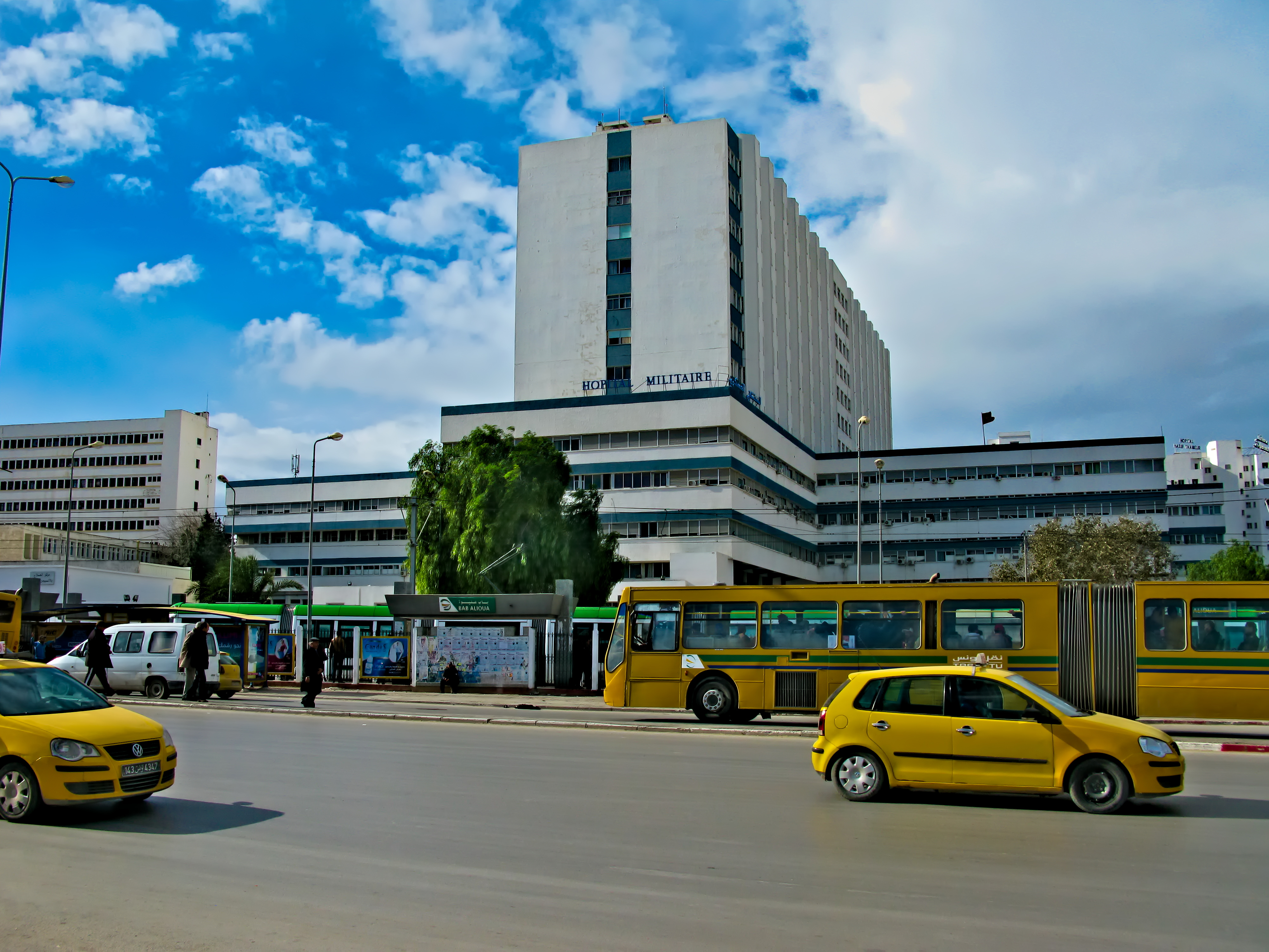 Vue de l'Hôpital militaire de Tunis avec, au premier plan, une station du métro léger, un bus et des taxis